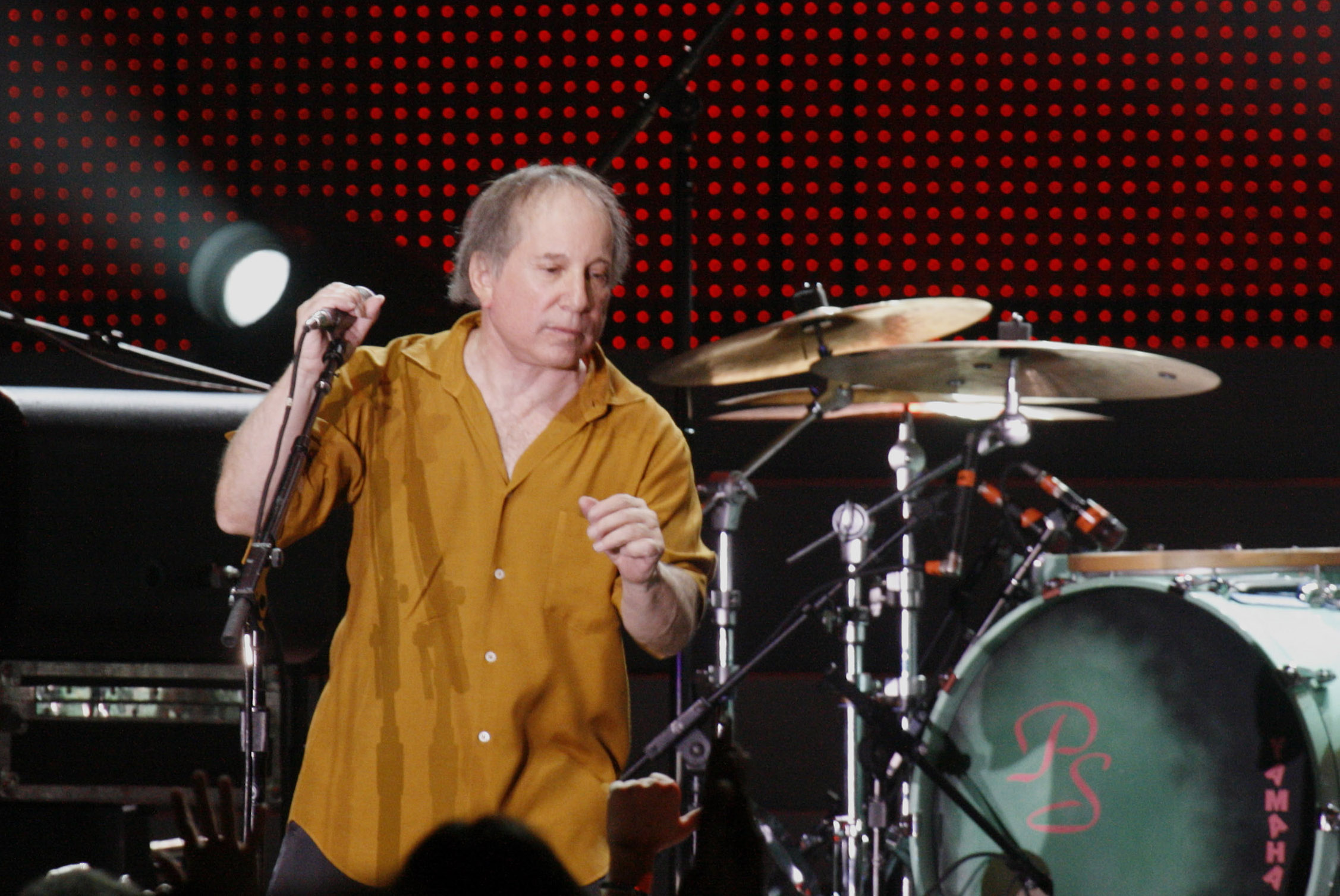 Paul Simon